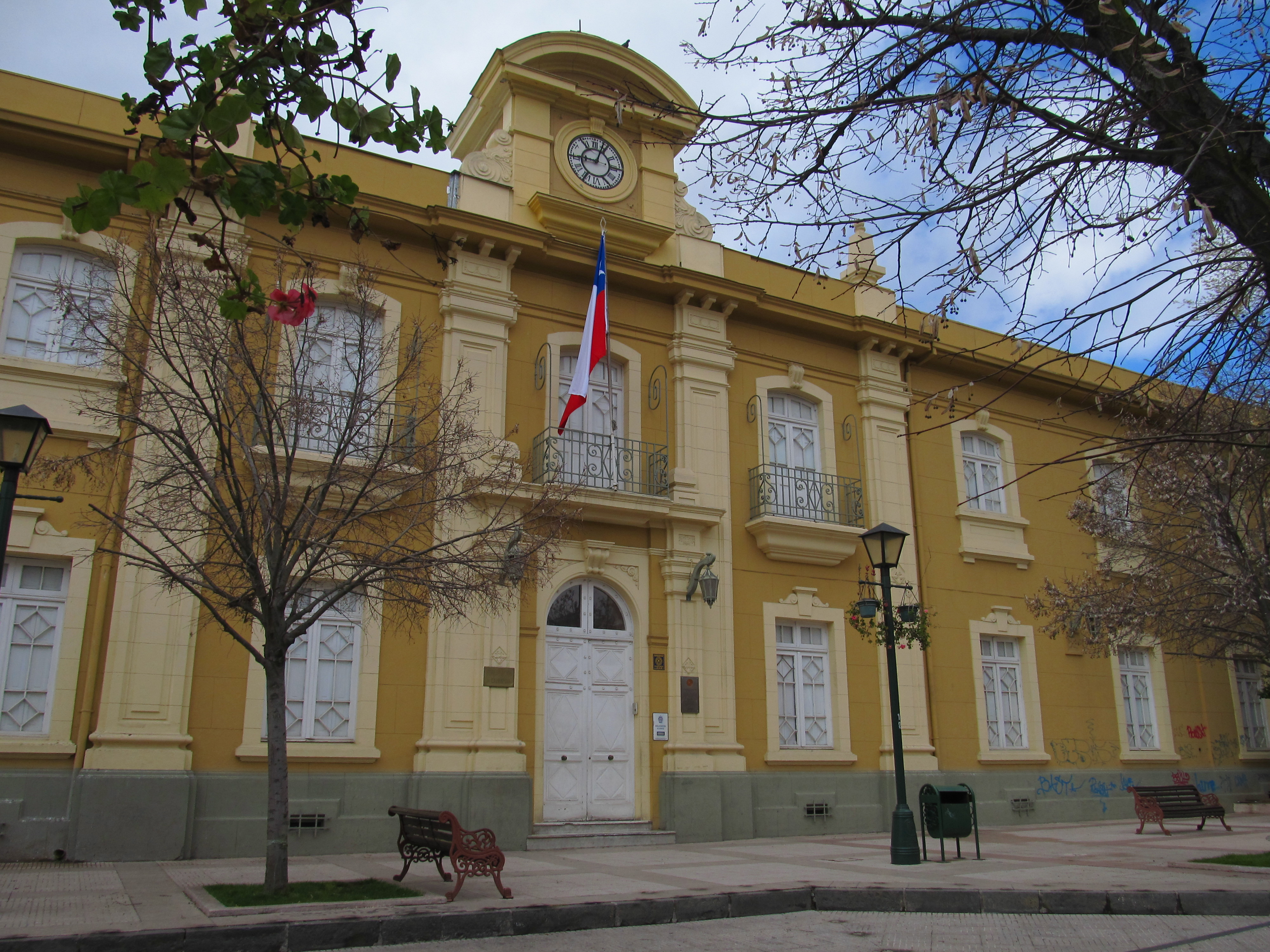 Gobernación de Provincia de Cachapoal This is a photo of a national monument in Chile: 641